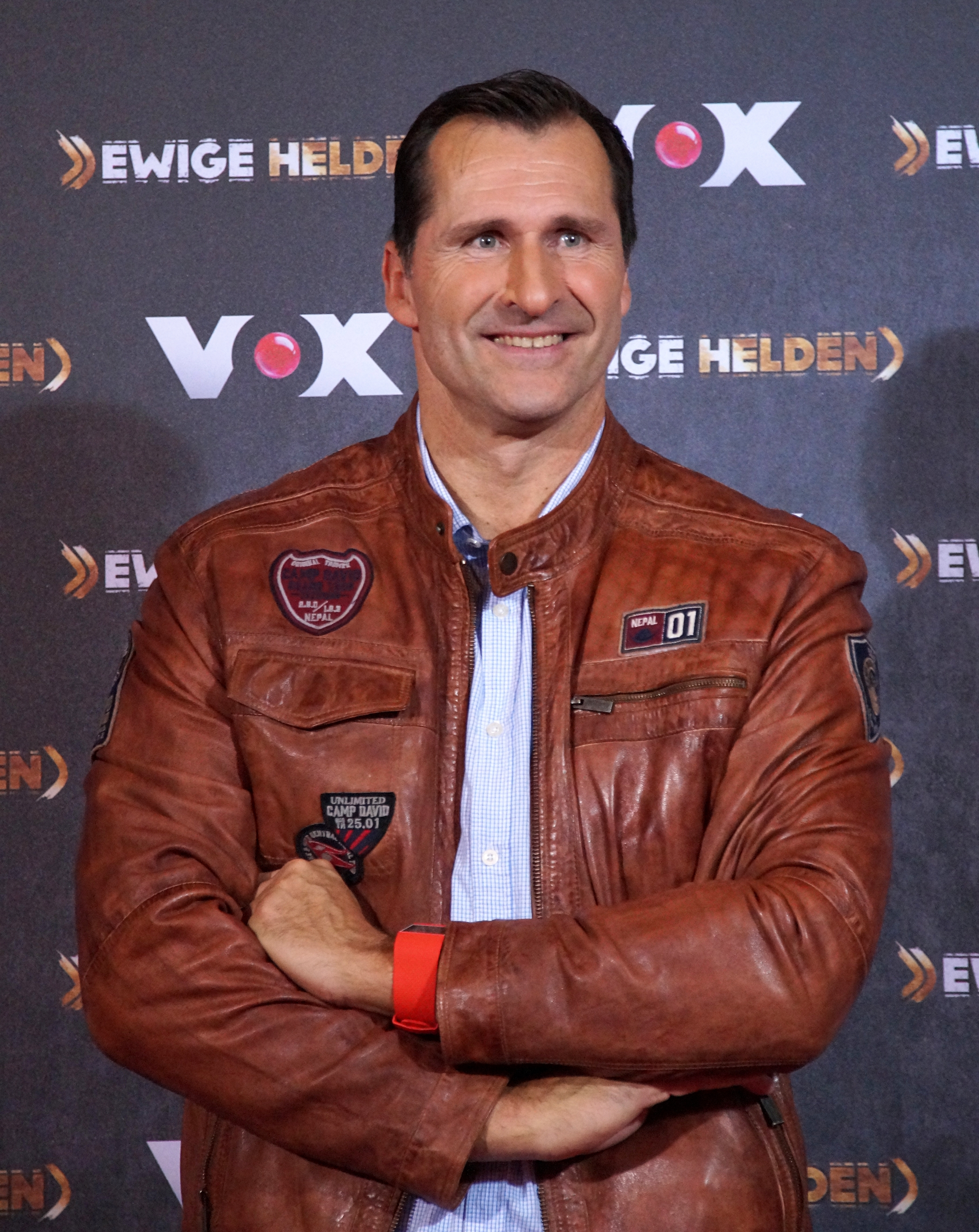 Lars Riedel beim VOX "Ewige Helden" Pressetermin, im Dezember 2015.